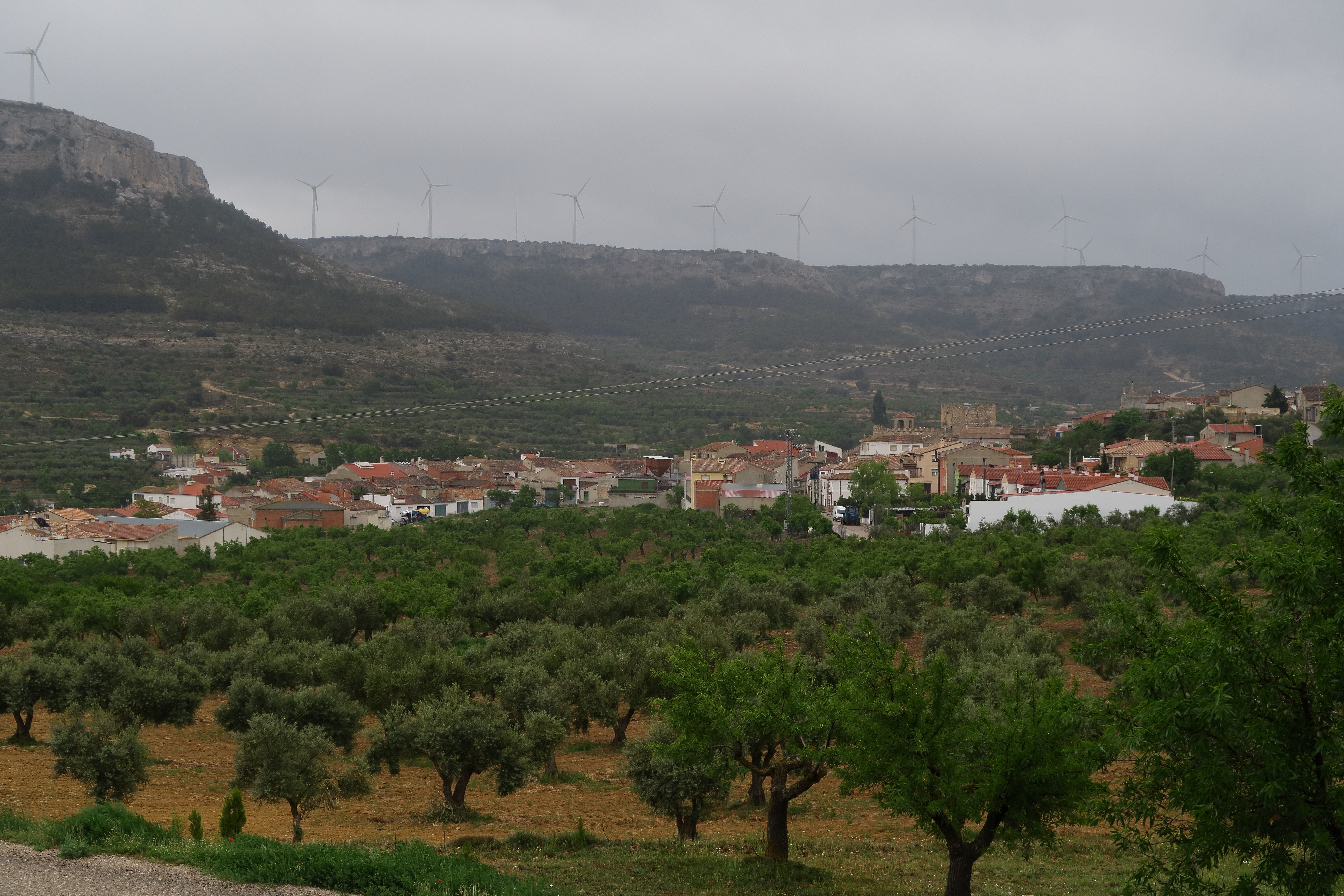 Carcelén, vista de la poblacion desde el helipuerto